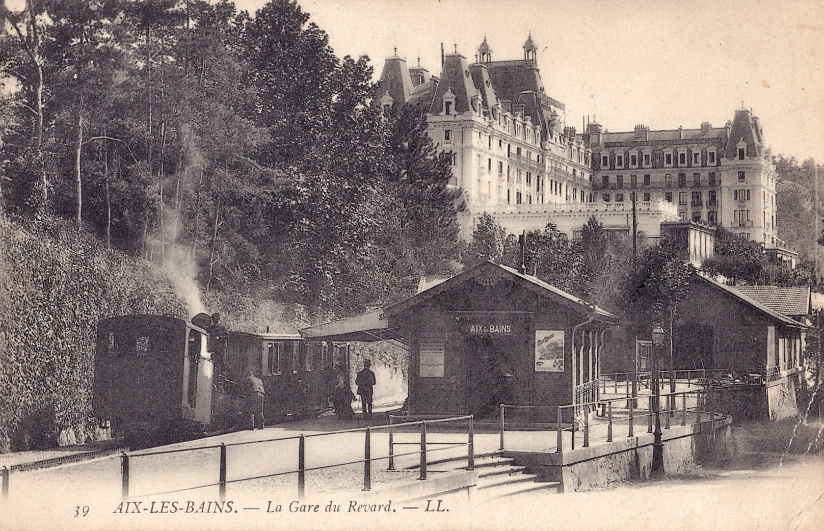 Carte postale ancienne éditée par LL, n°39 : AIX-LES-BAINS - La Gare du Revard